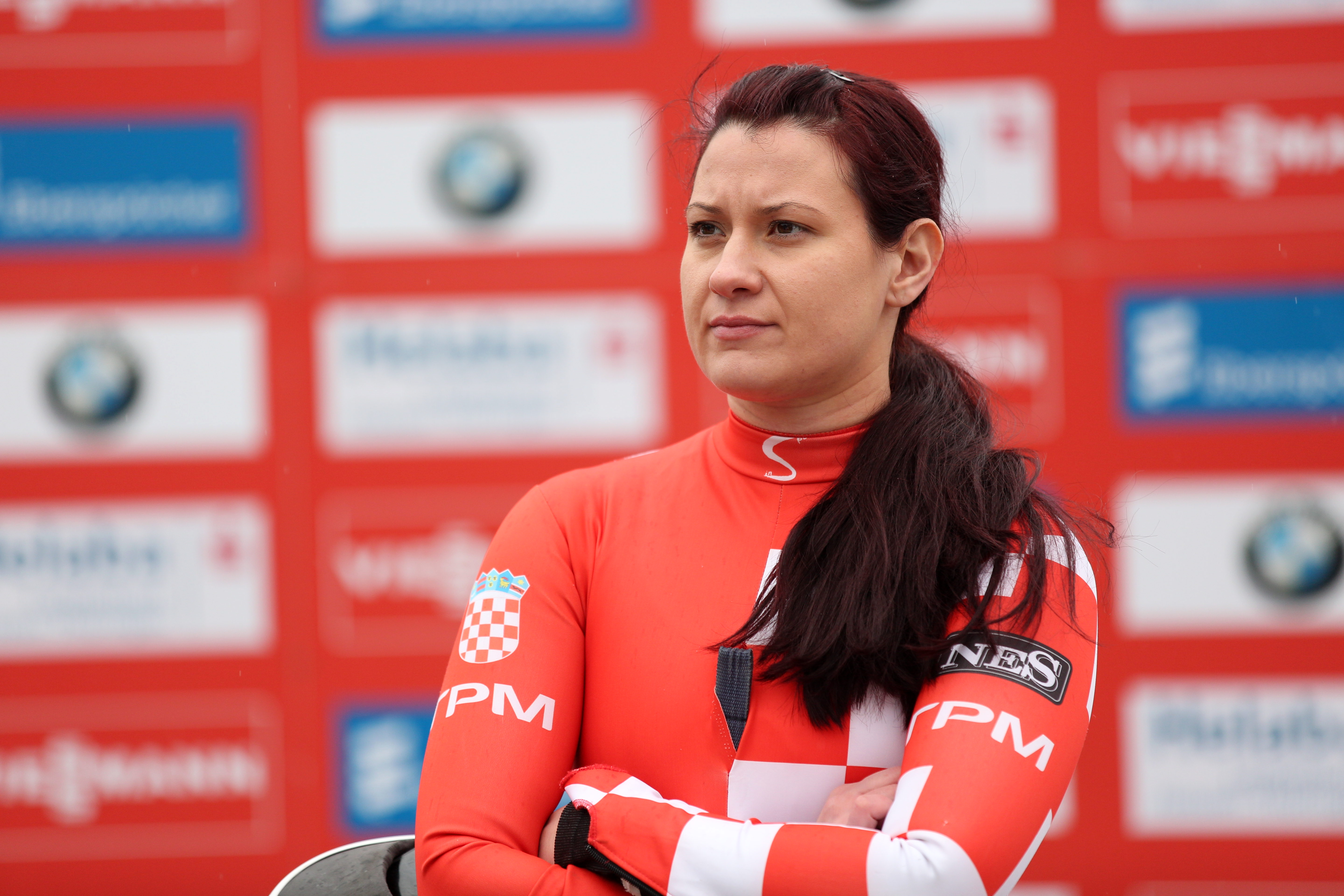 Daria Obratov beim HELABA Nationscup der Damen in Oberhof 2017